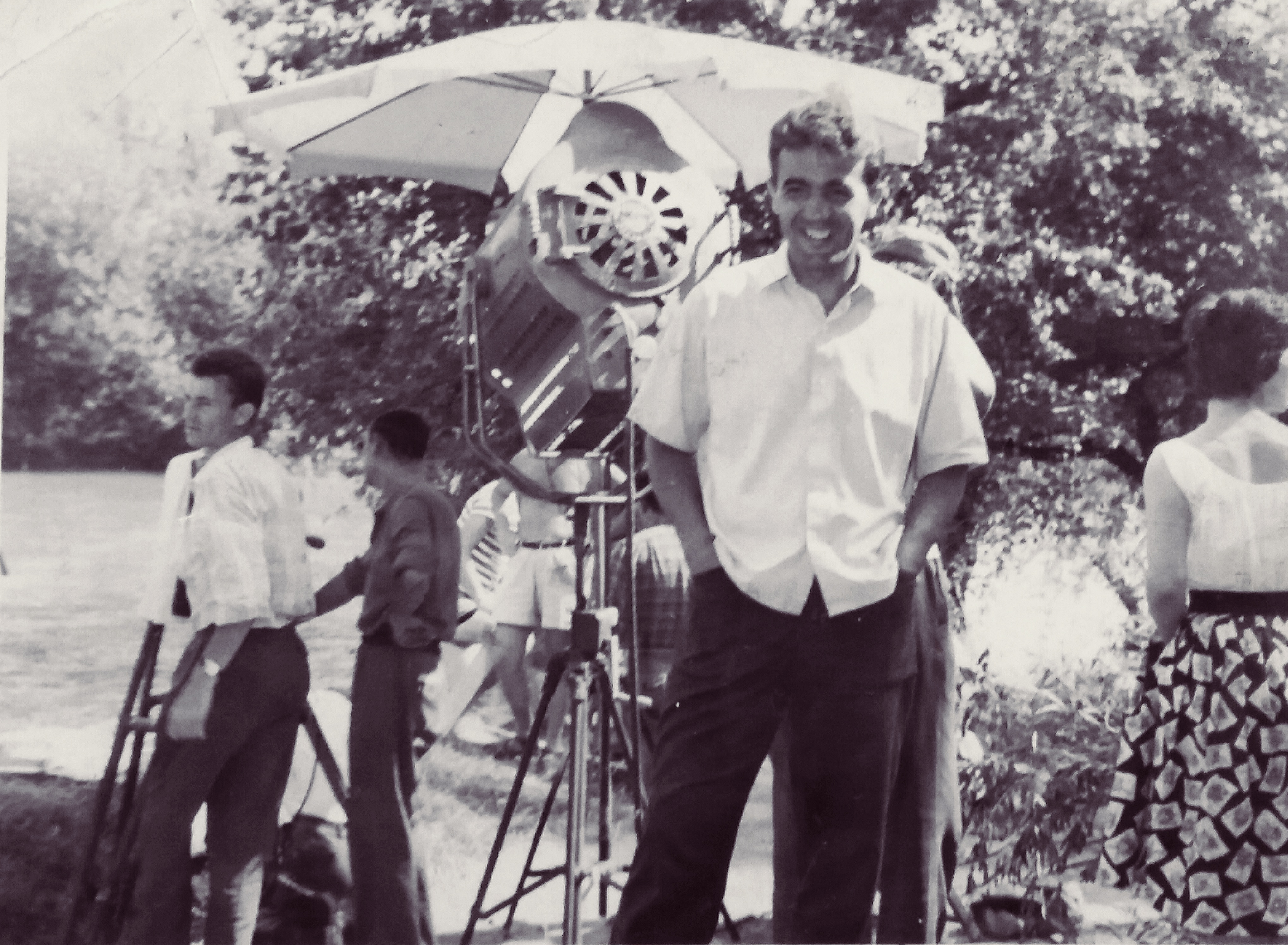 Petar Sobajic - Film producer